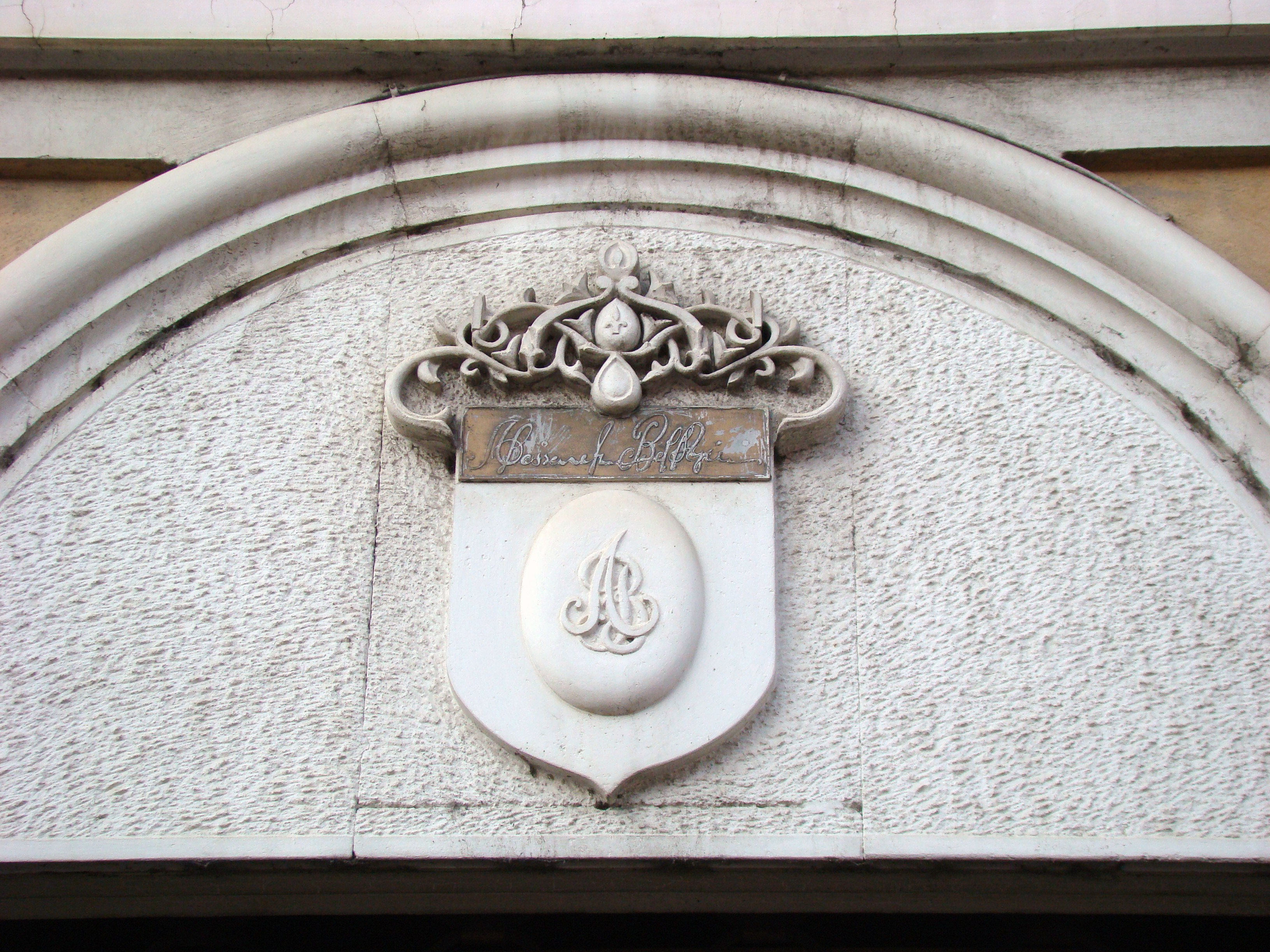 Clădire monument istoric, str.Regele Ferdinand nr.5 (detaliu)